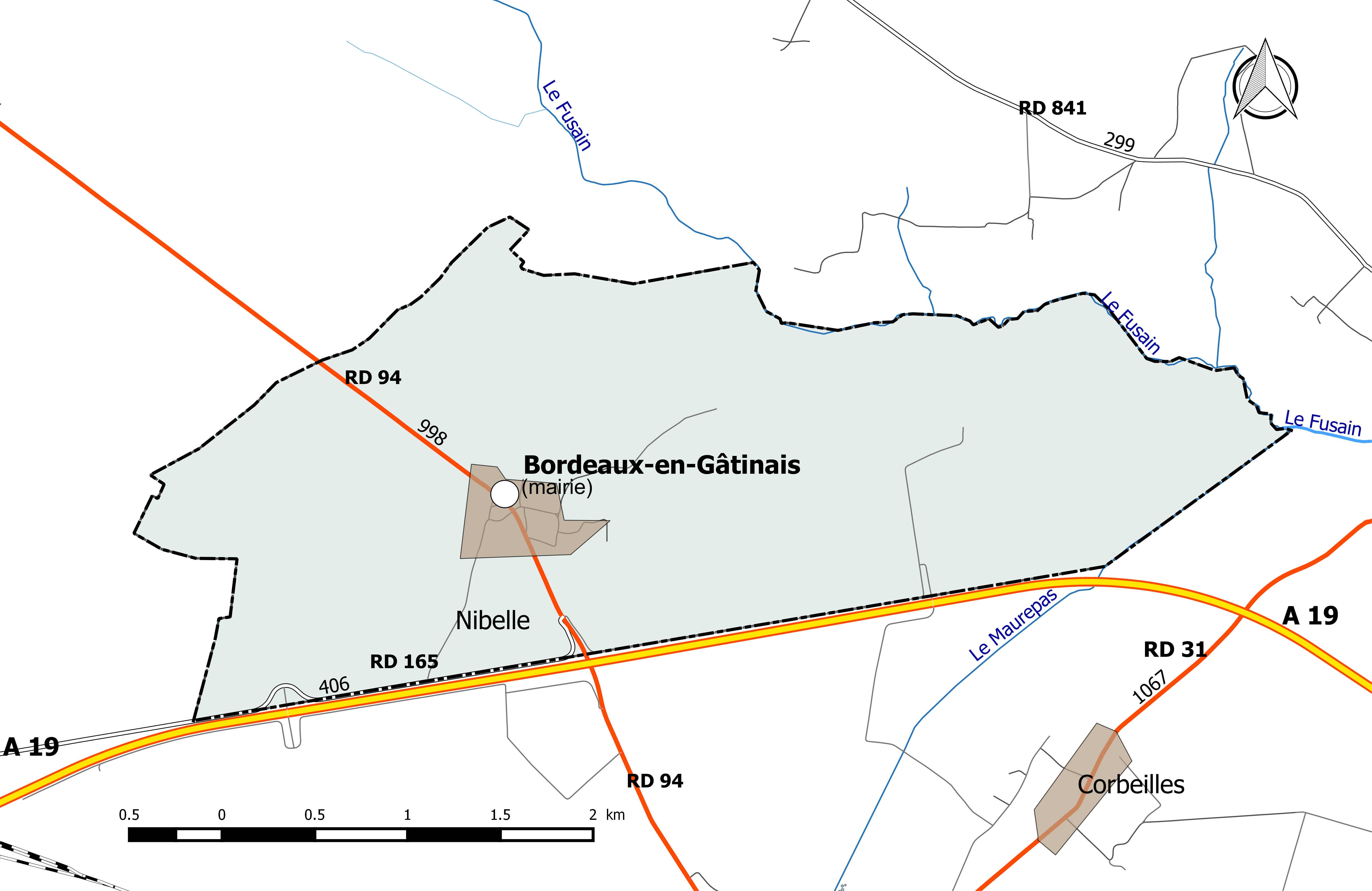 Carte du réseau routier de la commune de Bordeaux-en-Gâtinais.